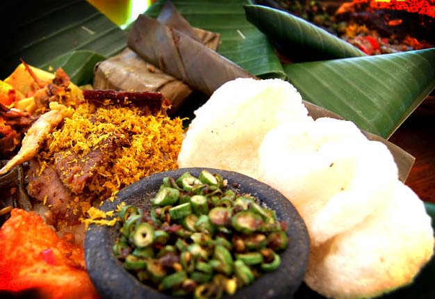 Nasi Punel